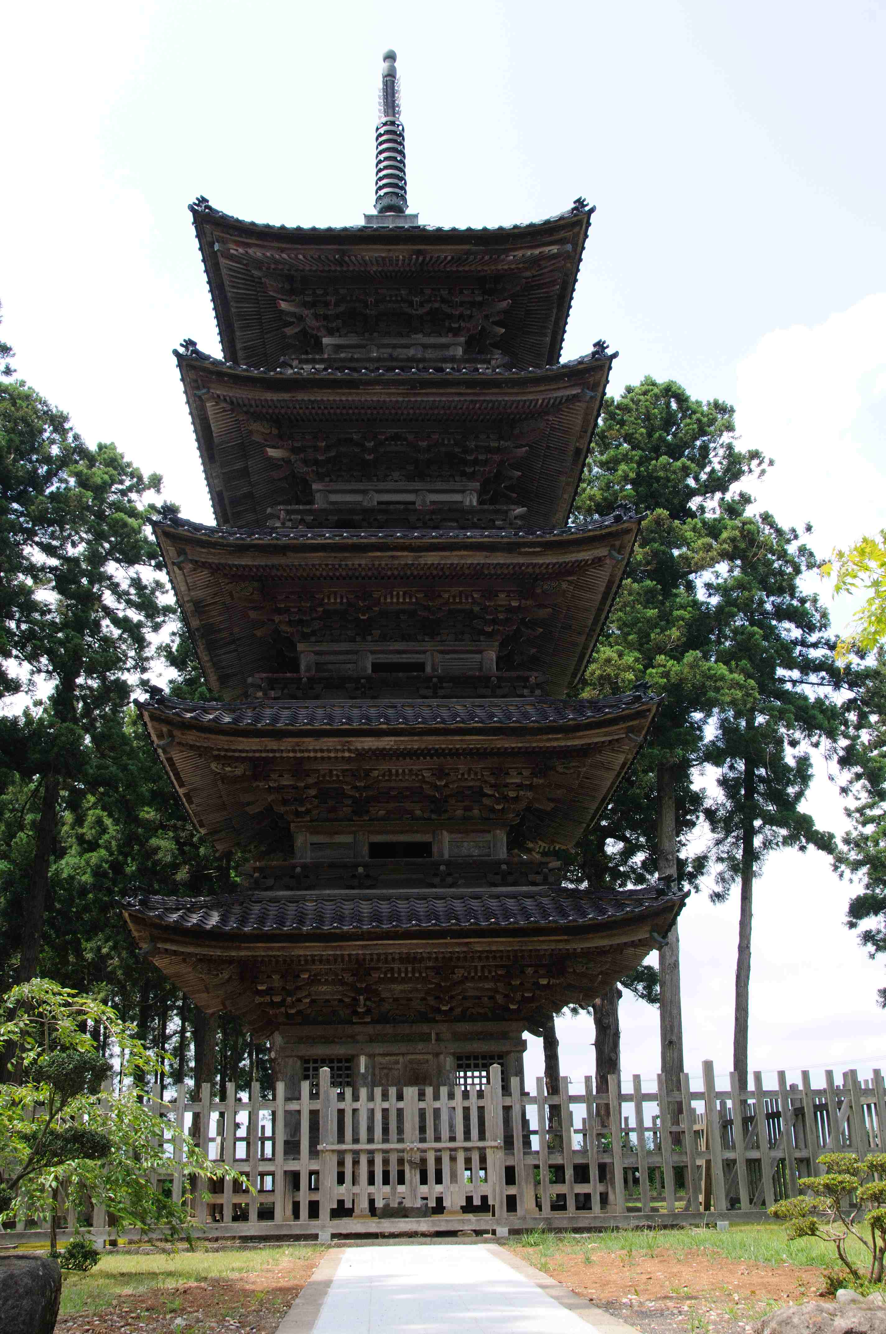 妙宣寺 (佐渡市)の五重塔